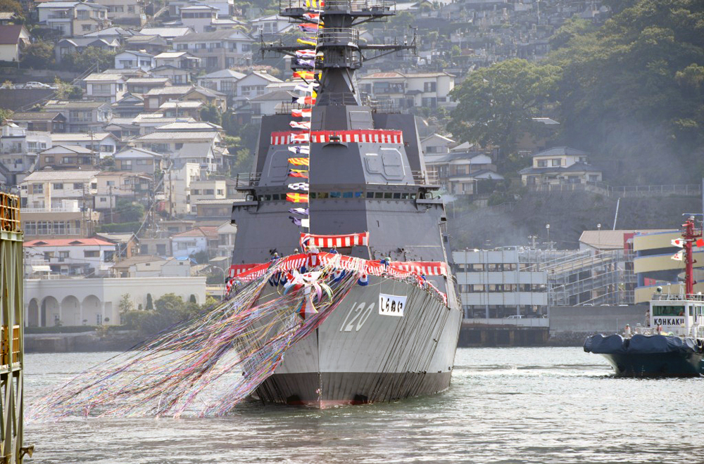 護衛艦しらぬい